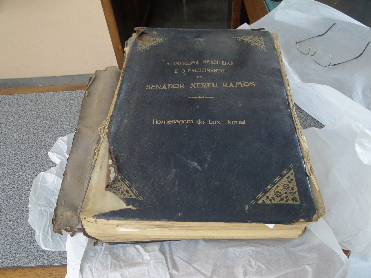 Volume contendo recortes sobre artigos de jornal sobre o acidente que vitimou Nereu Ramos